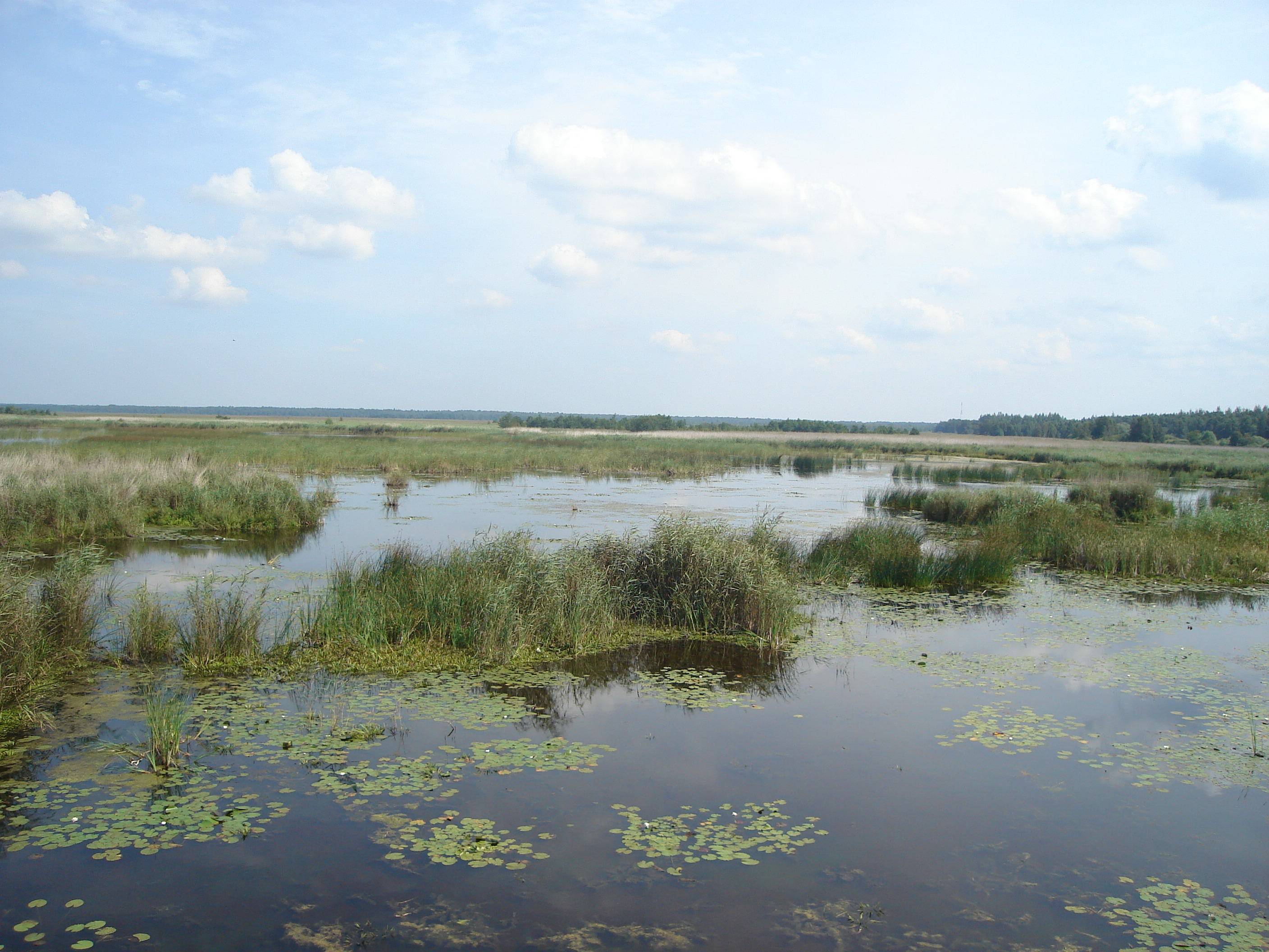 ezers